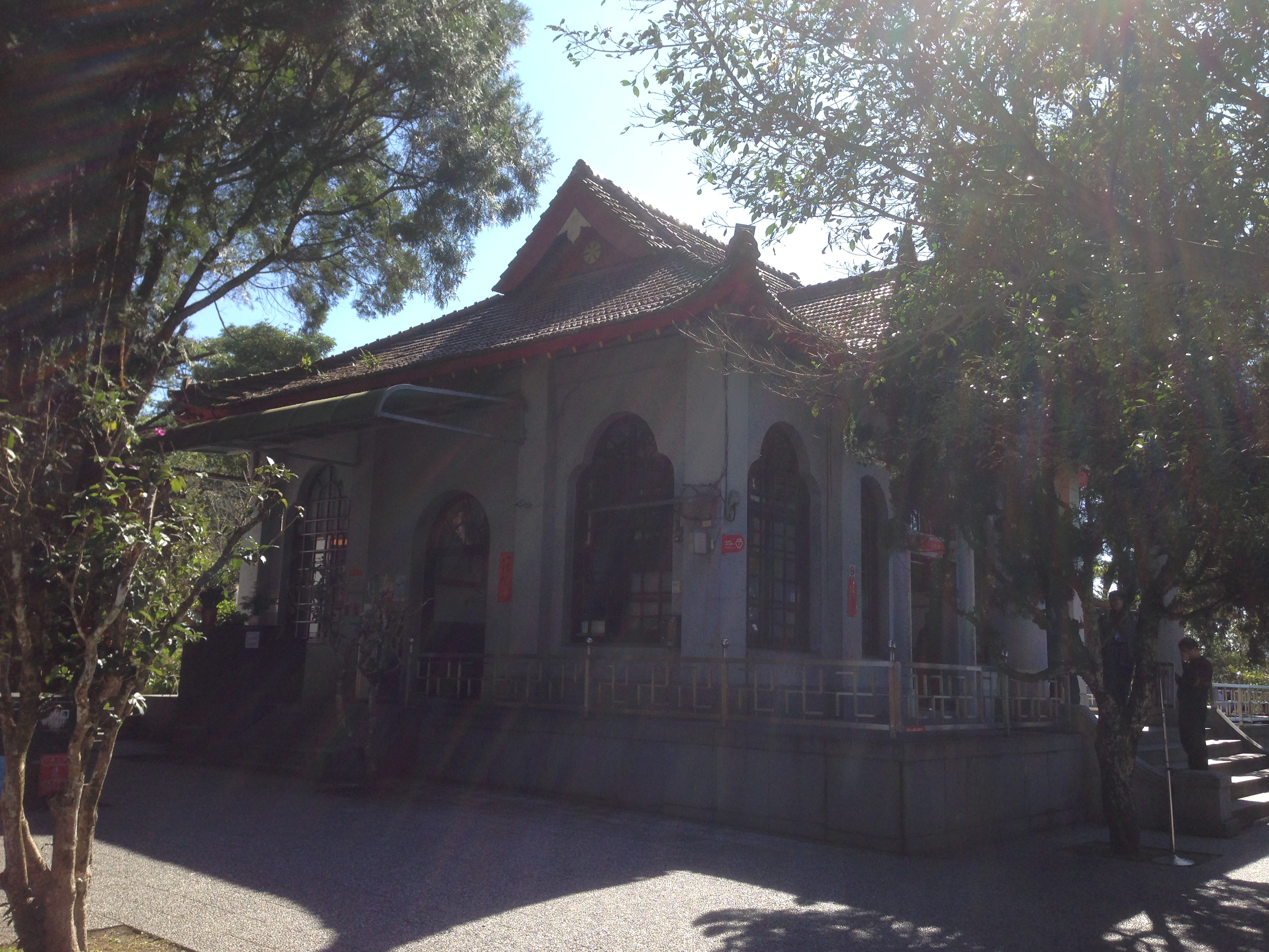 中文（台灣）: 玄光寺側面